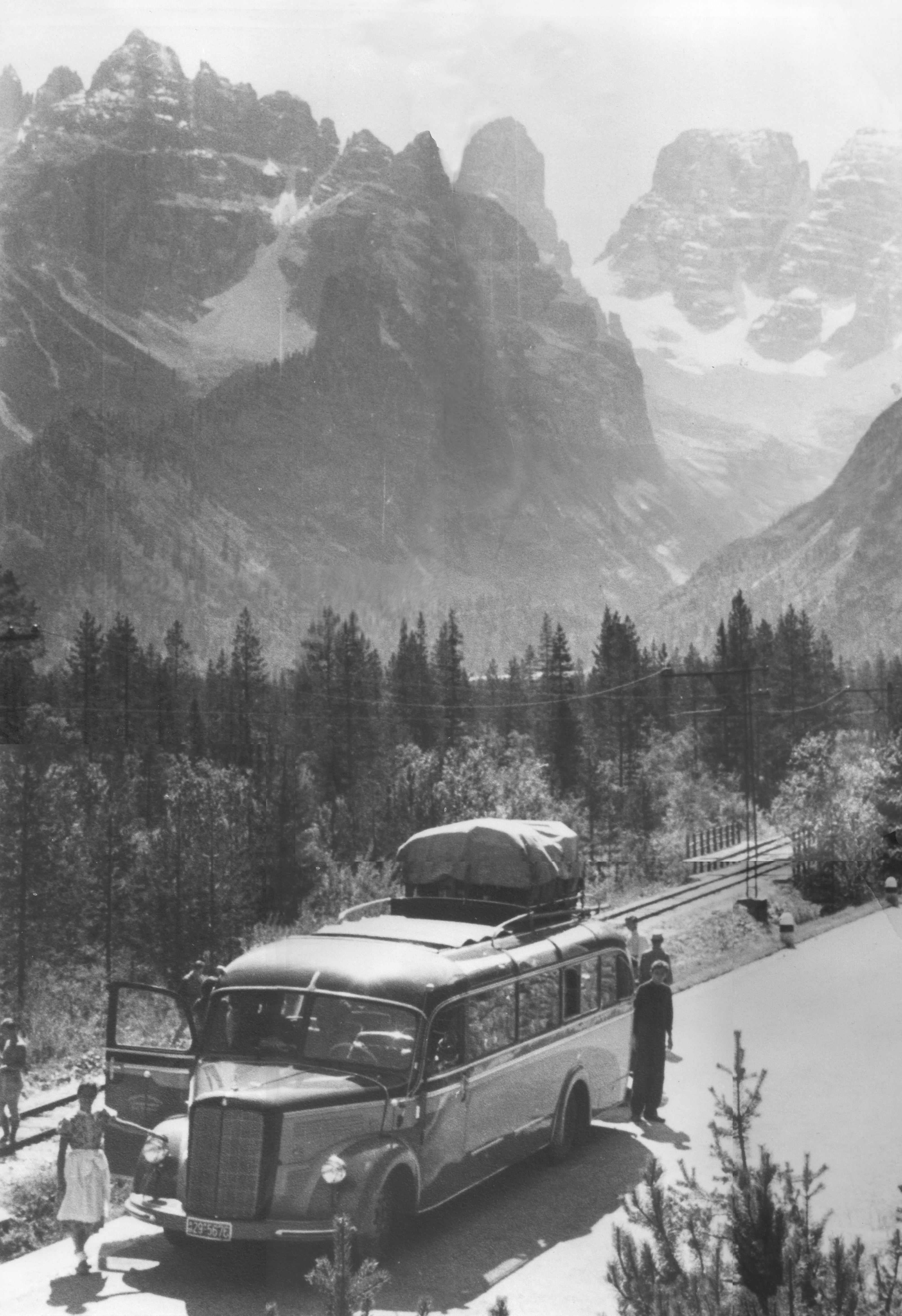 Bustourismus in den Nachkriegsjahren (1950).